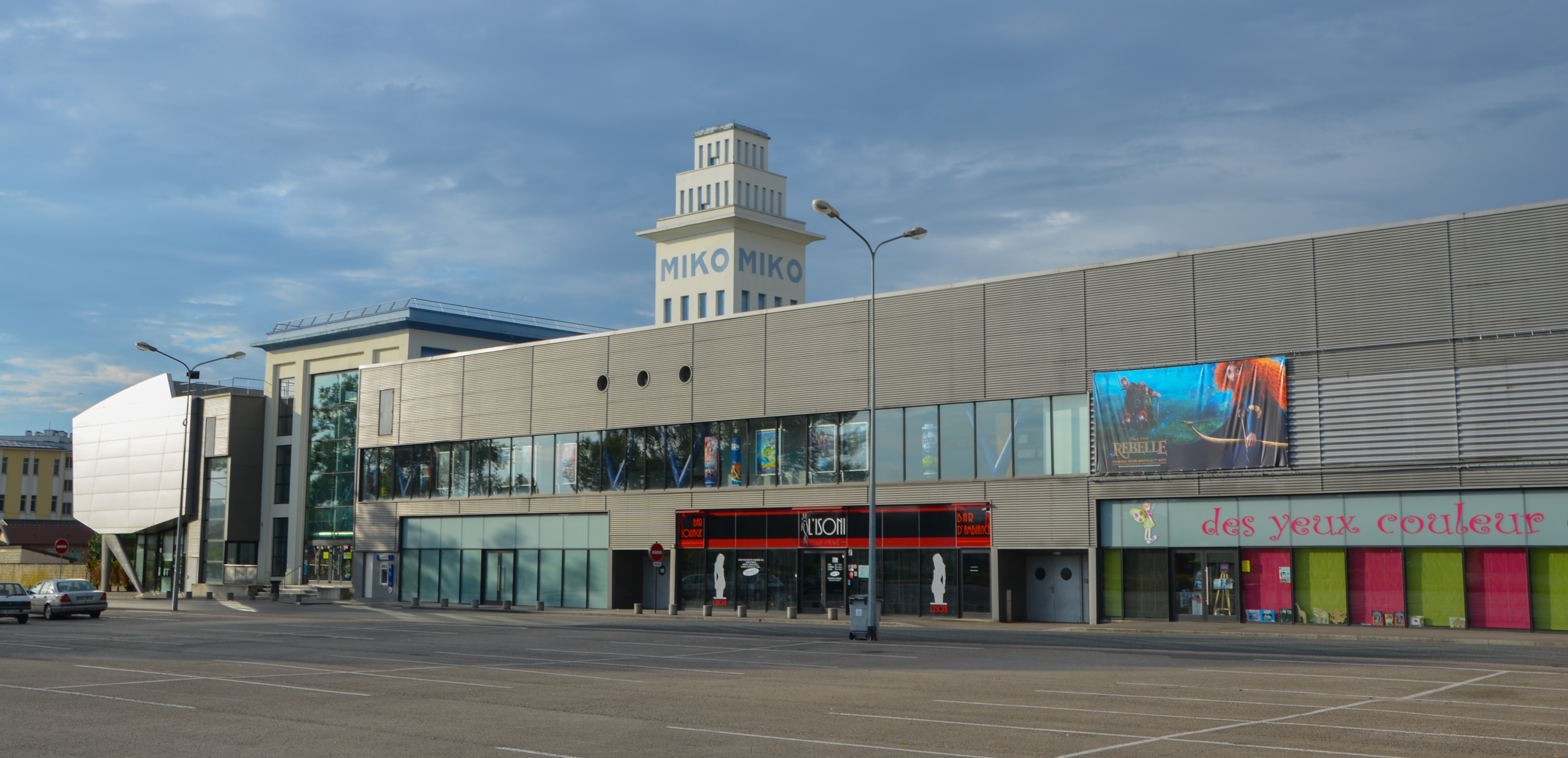 Tour Miko de St Dizier, Haute-Marne, France